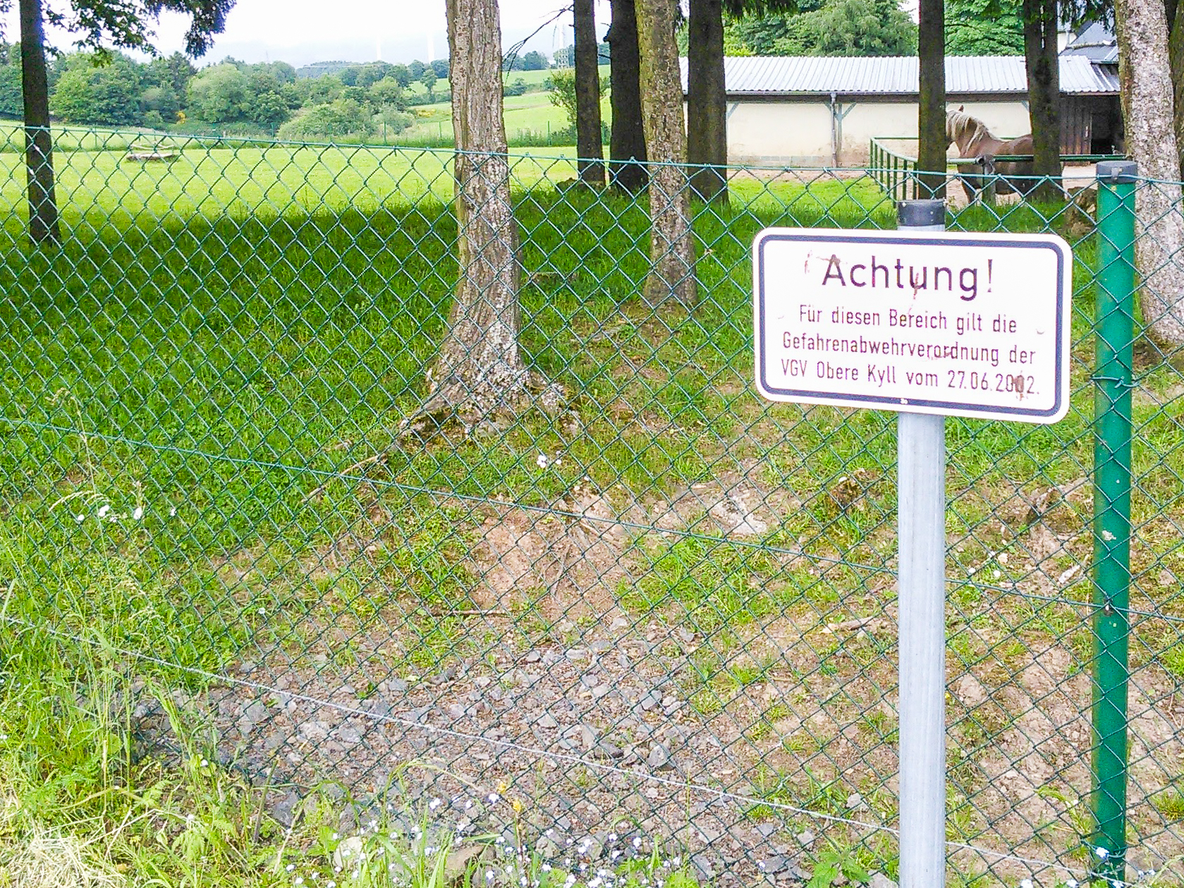 Gefahrenabwehrverordnung im Bereich des Geländes der ehemaligen ESPAGIT bei Hallschlag